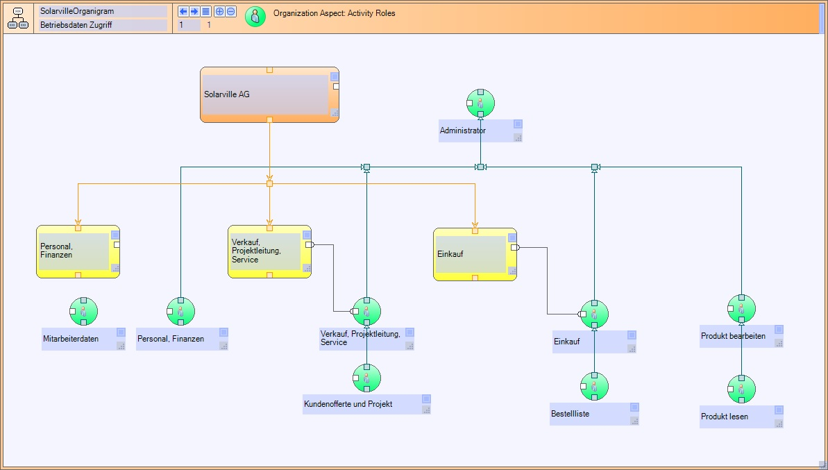 Organisationsdiagramm aus Posity